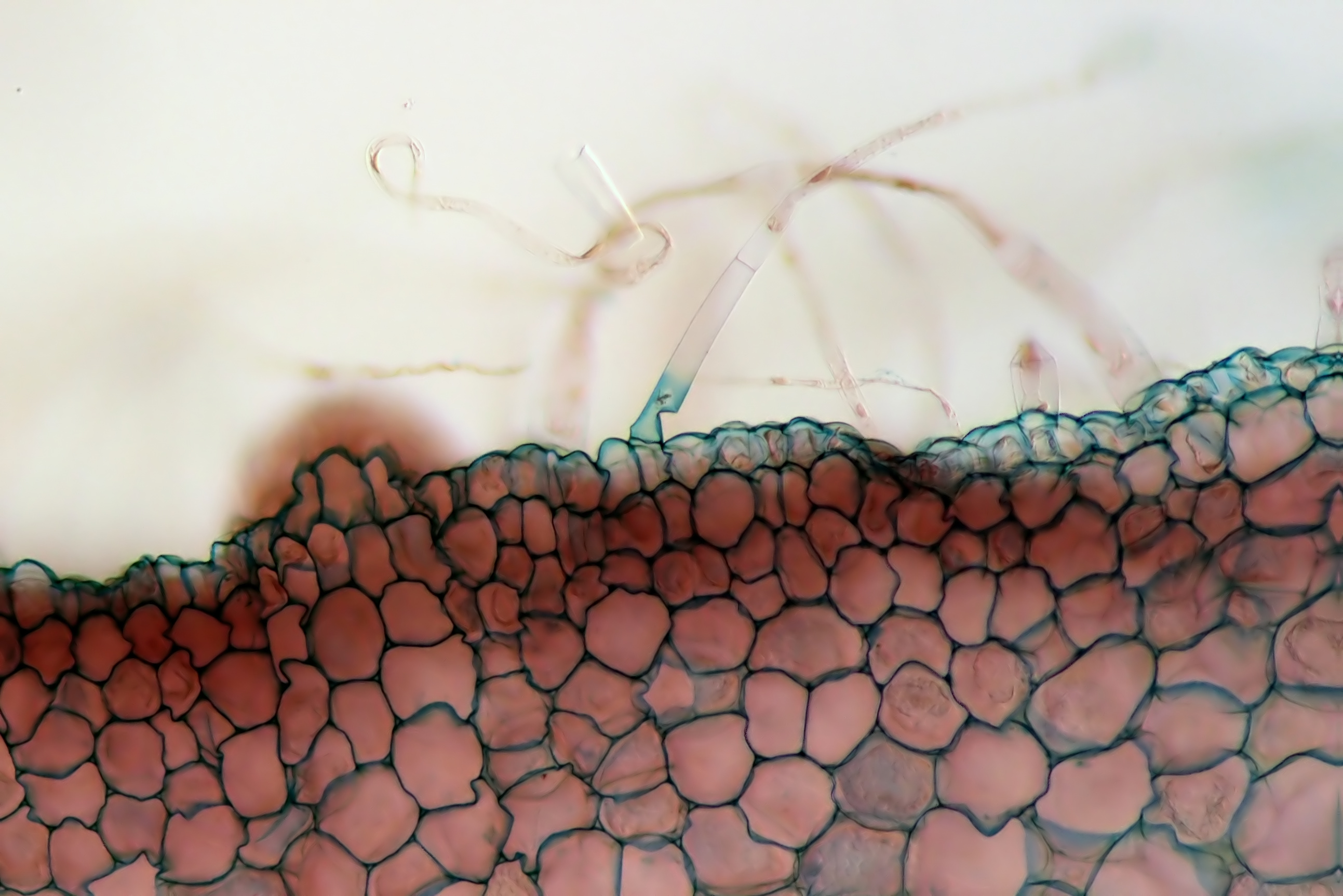 Solanum tuberosum, tiller, Etzold green.